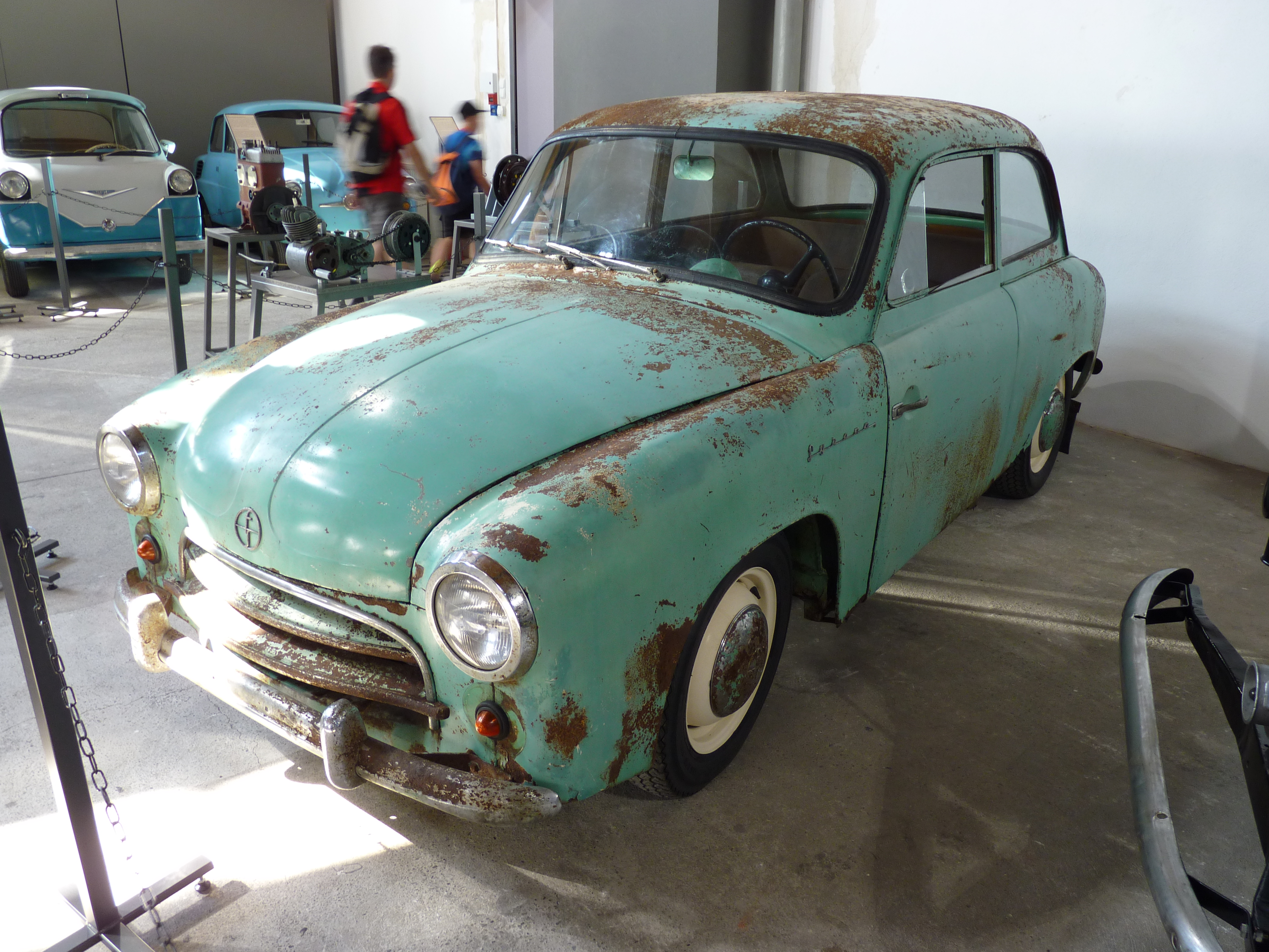 Muzeum Inżynierii Miejskiej